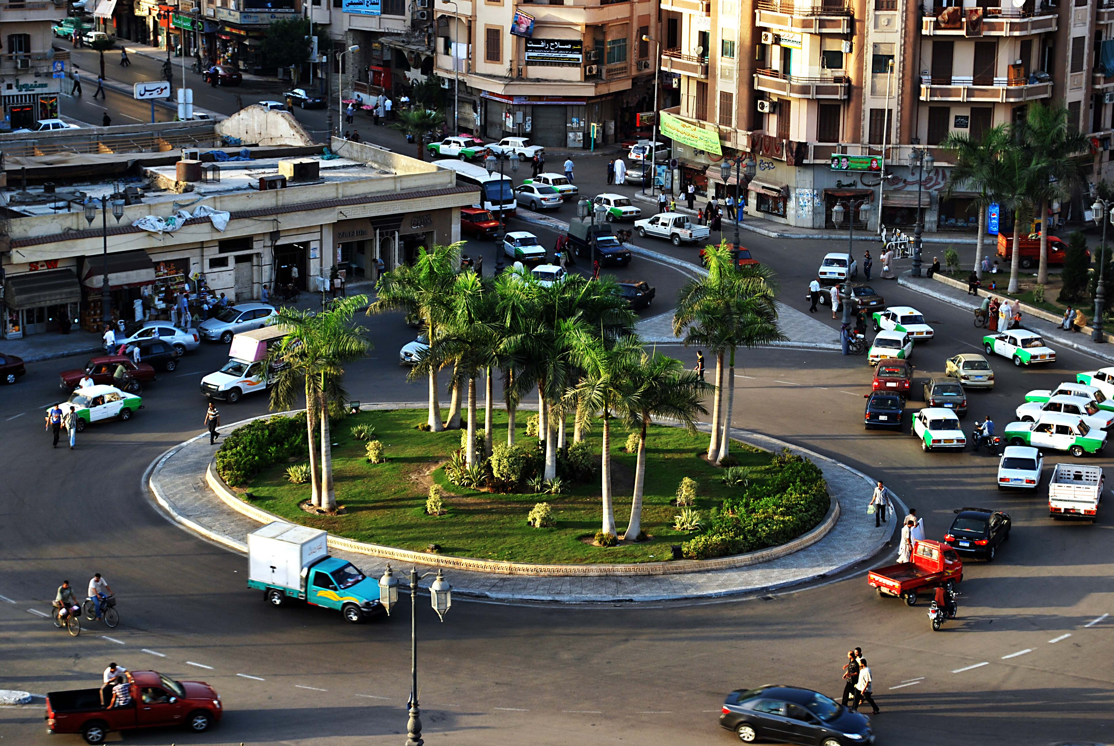 ميدان الأوبرا ( الساعة سابقاً ) بمدينة دمنهور, دمنهور، مدينة مصرية، تُلقب بعدة أسماء مثل: مدينة النور، ومدينة النصر، ومدينة البحيرة . تقع في شمال مصر، ودمنهور هي عاصمة لمحافظة البحيرة. تقع شمال غرب دلتا النيل، وتبعد عن الإسكندرية 60 كيلومتراً باتجاه الجنوب الشرقي. تشتهر بعدة مواقع ذات قيمة تاريخية وثقاقية مثل مسجد التوبة ومسجد الحبشي ودار أوبرا دمنهور. مدينة دمنهور تقع في شمال غرب الدلتا على خط طول 03' 31° شرقاً و28' 30° شمالاً، تتبع إدارياً محافظة البحيرة، دمنهور تتوسط تقريباً منطقة شمال غرب الدلتا، يحيط بالمدينة أرض سهلية منبسطة من جميع الاتجاهات، وتخترقها ترعة المحمودية.